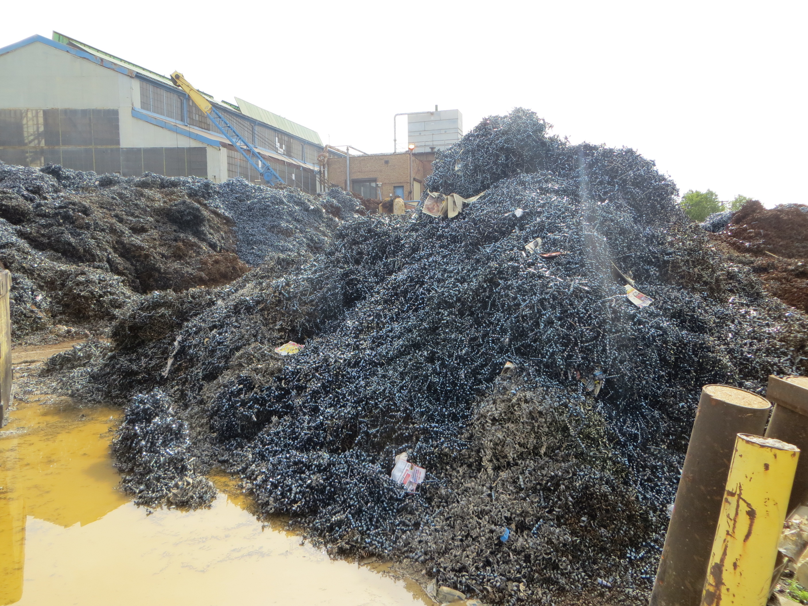 20130604 84 A Finkl & Sons